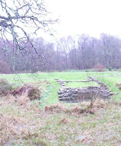 Ruins at the first site of Caerlaverock Castle